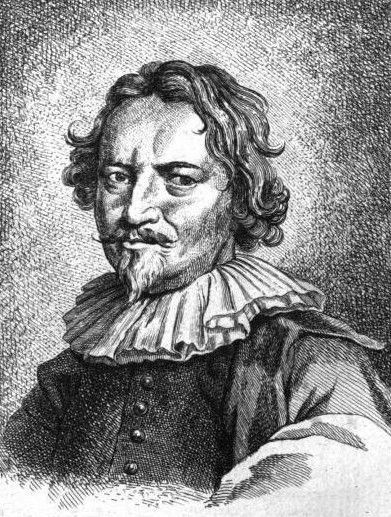 Portrait des italienischen Architekten Carlo Fontana.